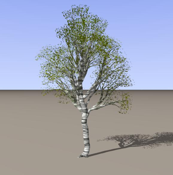 Dit is een 3D-demonstratie voor het door de computer laten genereren van een boom. Deze boom is gemaakt met de vrije open source TOMTREE definitie van kunstenaar Tom Aust [1], daarbij is gebruik gemaakt van het gratis en vrij te gebruiken POV-Tree, en tot slot met het gratis en vrij te gebruiken POV-Ray tot een plaatje verwerkt.